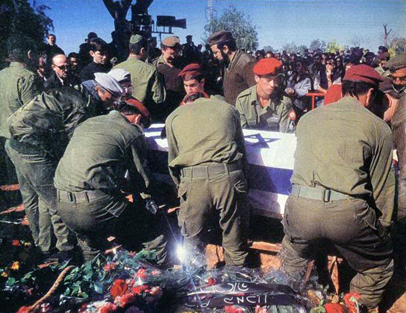 הלווית חלל אסון המסוקים